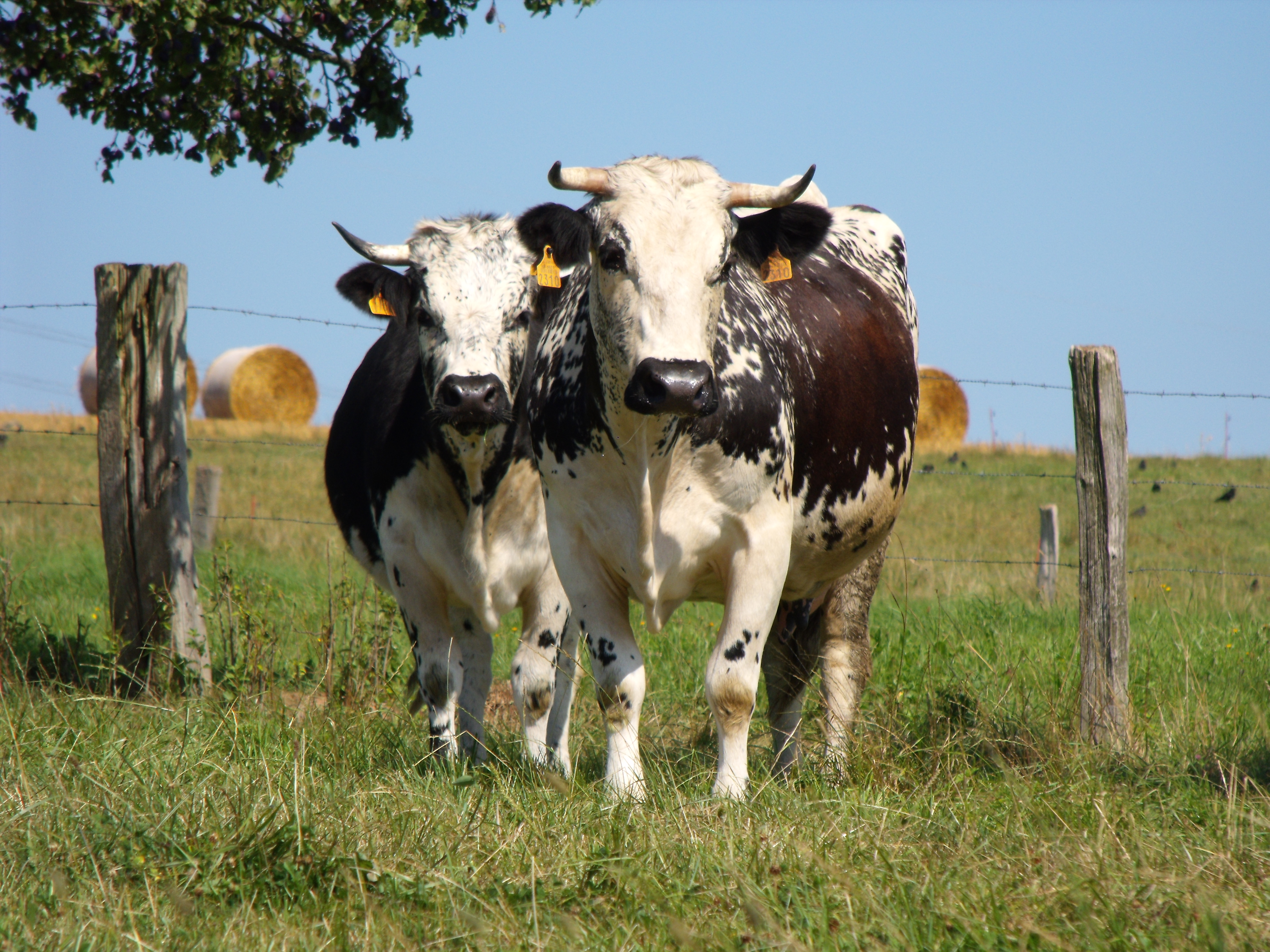 Vogesenrinder vom Huf-Hof